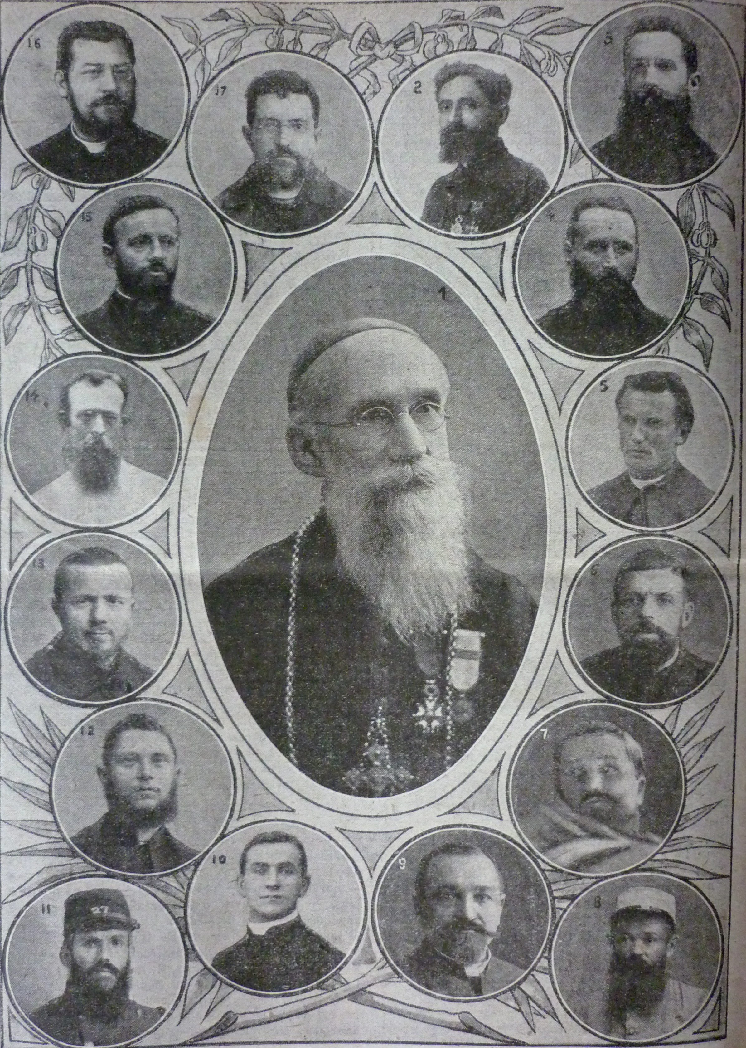 Naufragés missionnaires victimes de l'Afrique, Mgr Hyacinthe Jalabert (médaillon central), les Pères (P.) et Frères (Fr.) du Saint-Esprit : P. Paul le Sellier (n°2), P. Stanislas Beneteau (n°3), P. Eugène Guyenot (n°4), P. Joseph Michel (n°5), P. Théodore Leray (n°6), Fr. Crépin Benoit (n° 7), P. Antonin Muratet (n°8), Fr. Hermas Huck (n°9), P. Arsène Haekly (n°10), Fr. Léger Mona (n° 11), P. Jean Van Dooren (n° 12), P. Joseph Siffert (n°13), Fr. Marcien Neumayer (n°14) ,P. Jospeh Le Leal (n° 15), P. Marius Testault (n°16), P. Alexandre Monnier (n° 17)